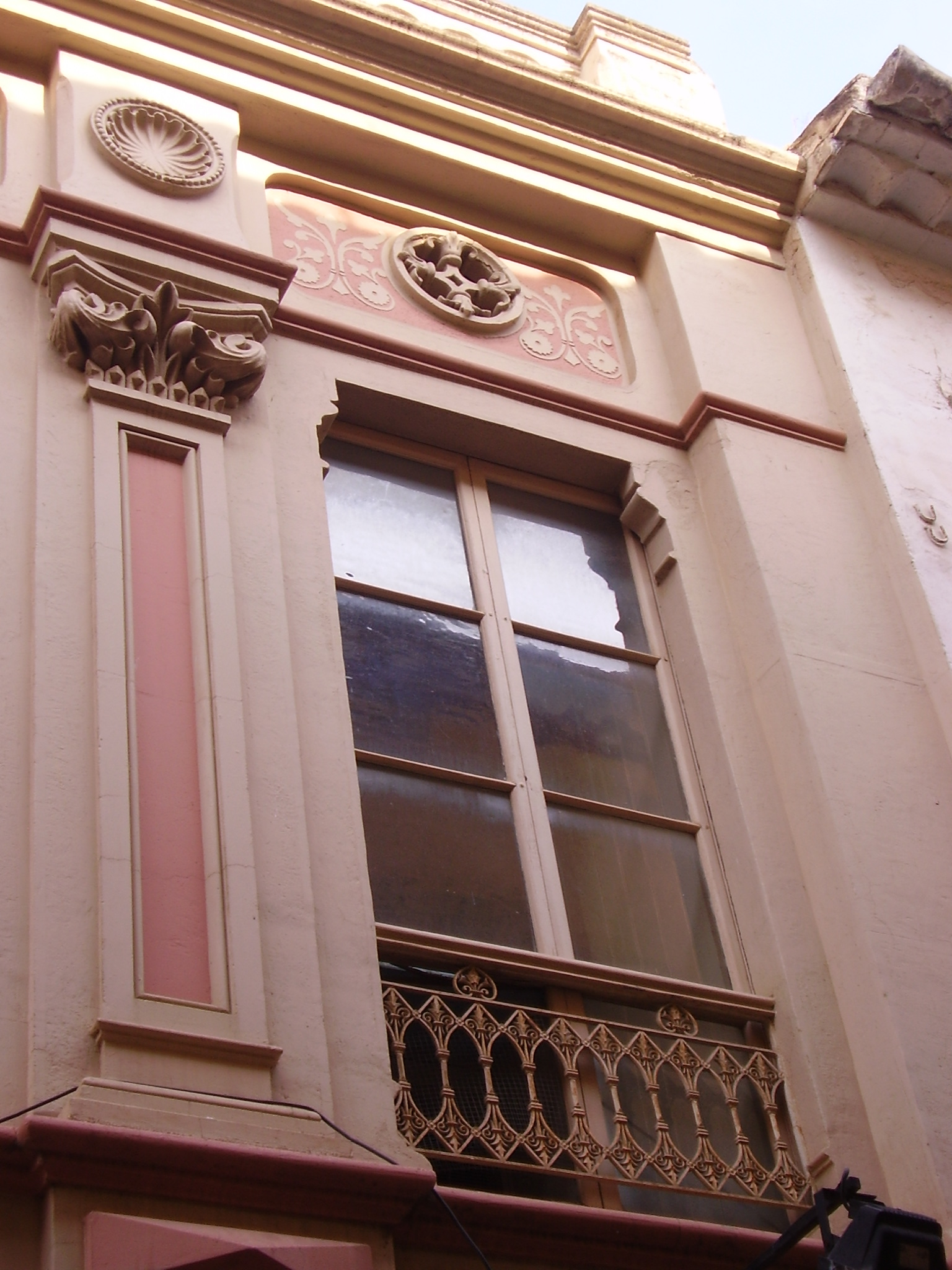 Magatzems Casa Granés (Palafrugell)